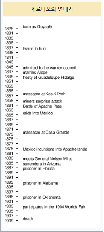 제로니모의 연대기